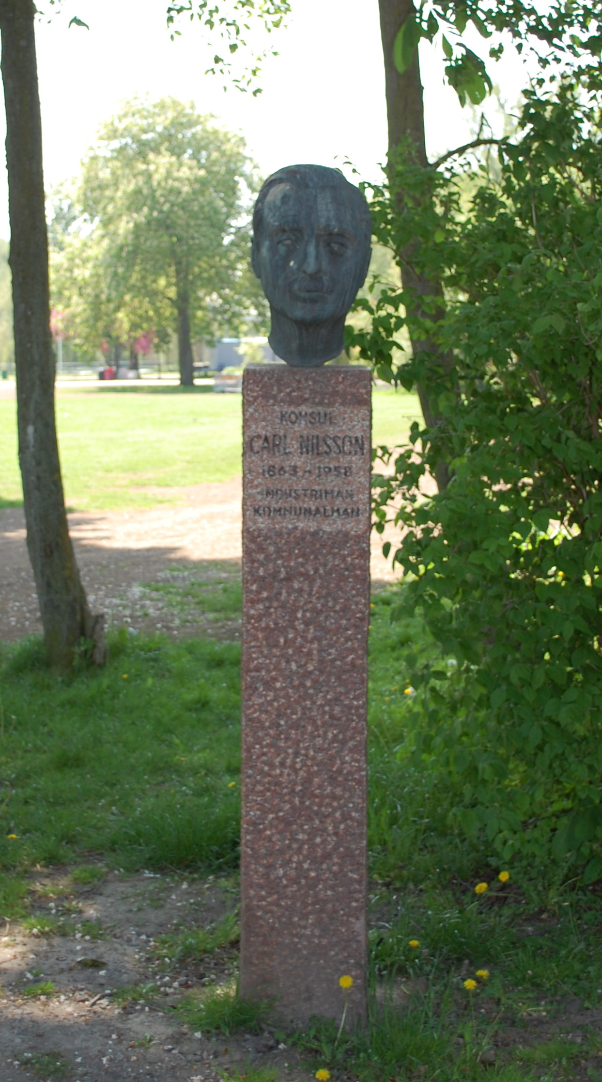 Denkmal für Carl Nilsson im Tivolipark in Kristianstad